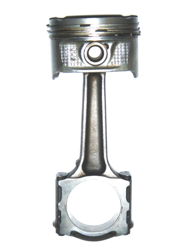 Kolben mit Pleuel. Kolben eines V6 24V Fremdzünder.